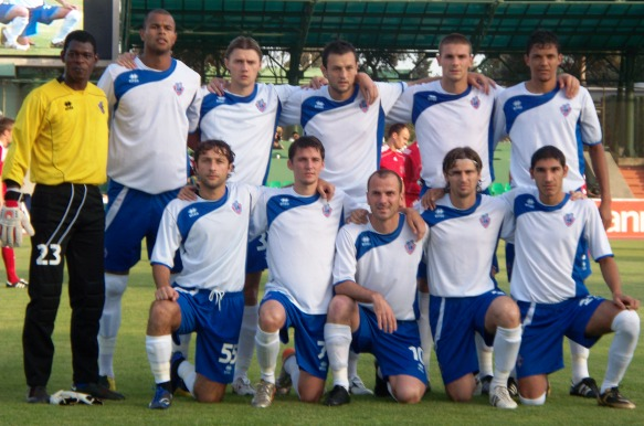 ФК Баку